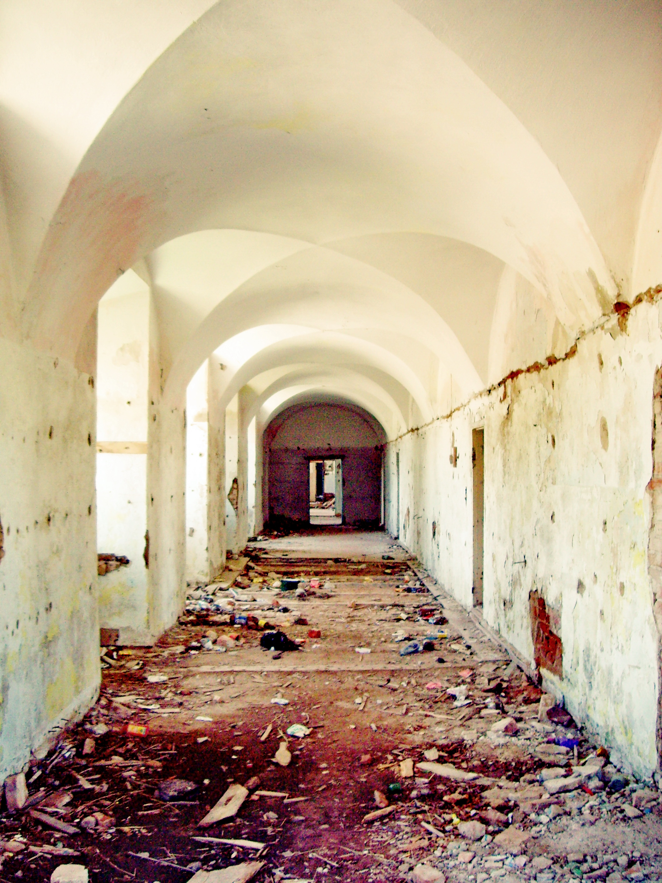 Беларуская (тарашкевіца): Ансамбль былога манастыра базылян: Петрапаўлаўская царква са званіцай, агароджай і брамамі дэкаратыўнае аздабленьне інтэр’ера царквы: тры алтары, амбон жылы корпус капліца. в. Баруны This is a photo of Belarusian heritage monument. Reference number: 412Г000062 ( WLM)